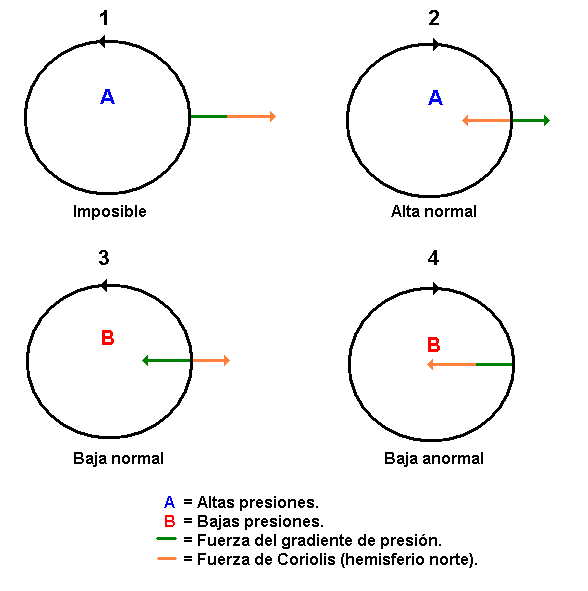 Gradient win possibilities